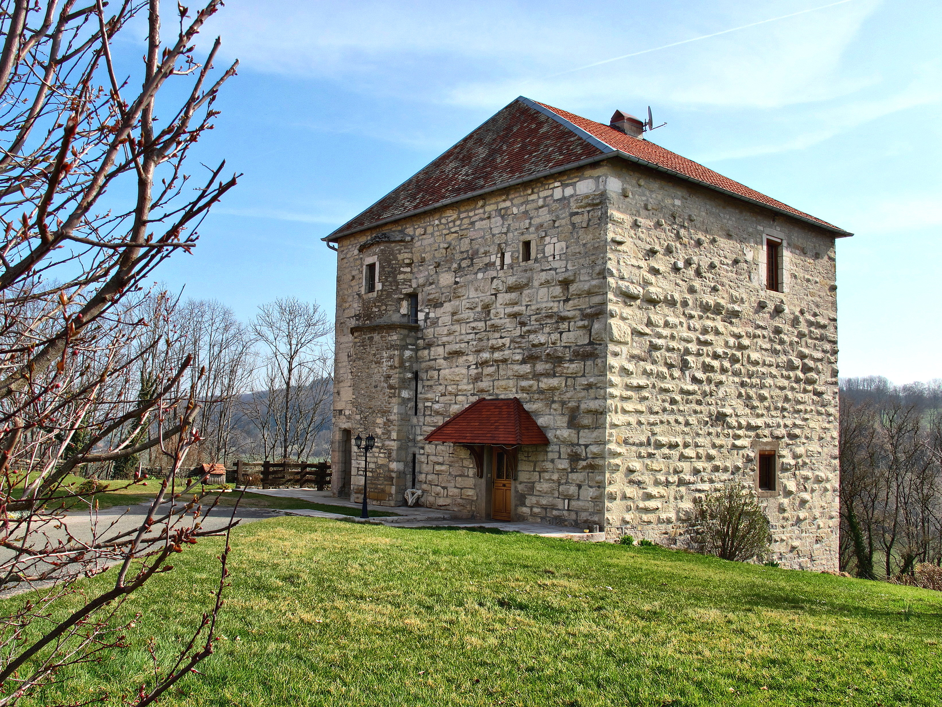 Inscrit aux monuments historiques sous le numéro PA00101633